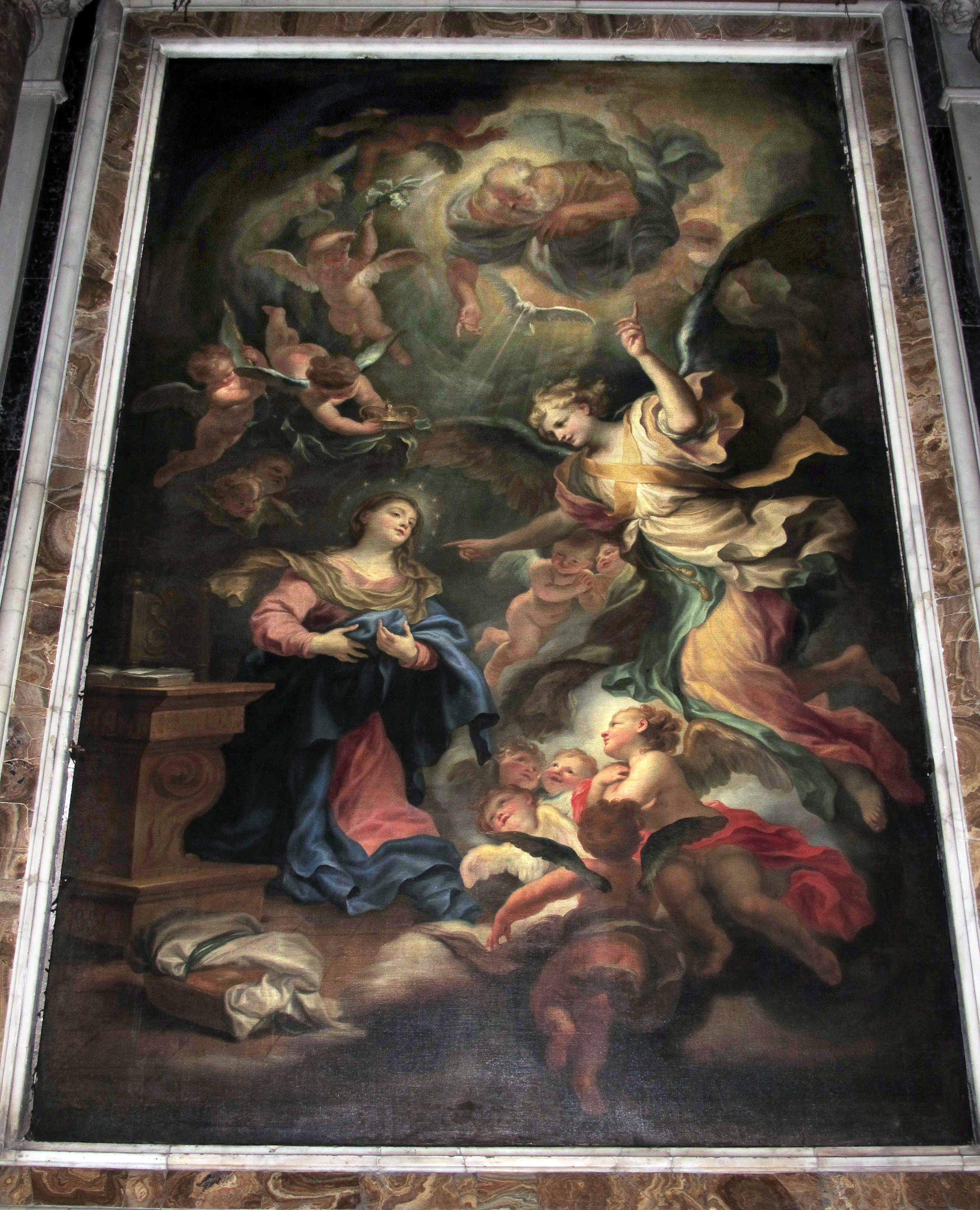 Genova, Liguria